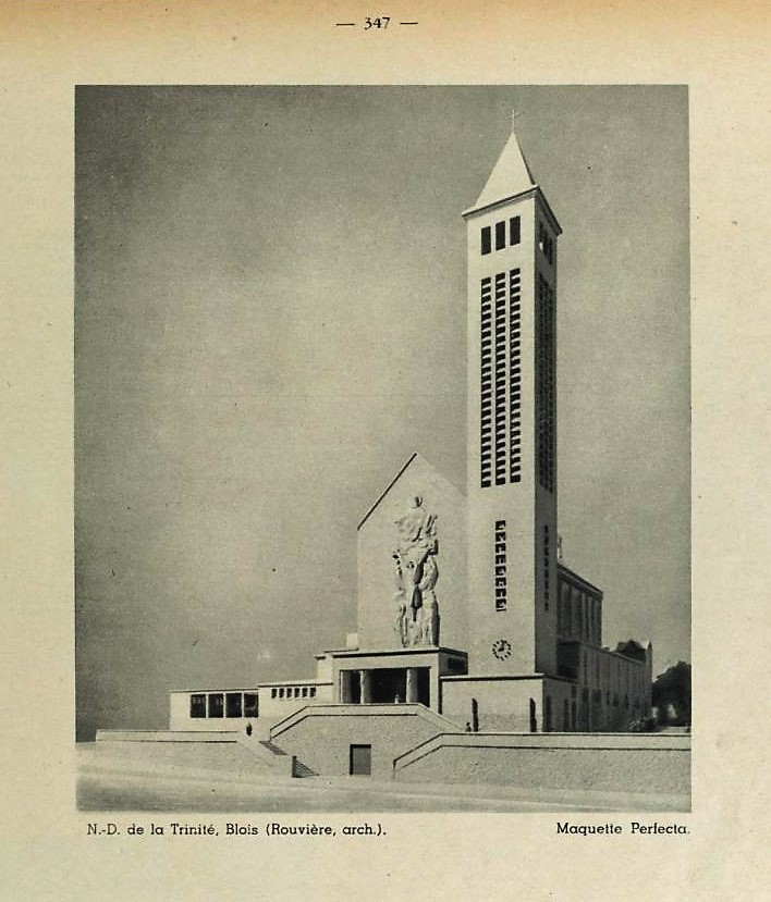 Revue de 1938 L'Art Sacré abordant le projet de basilique des Trois Ave Maria de Blois - Maquette.